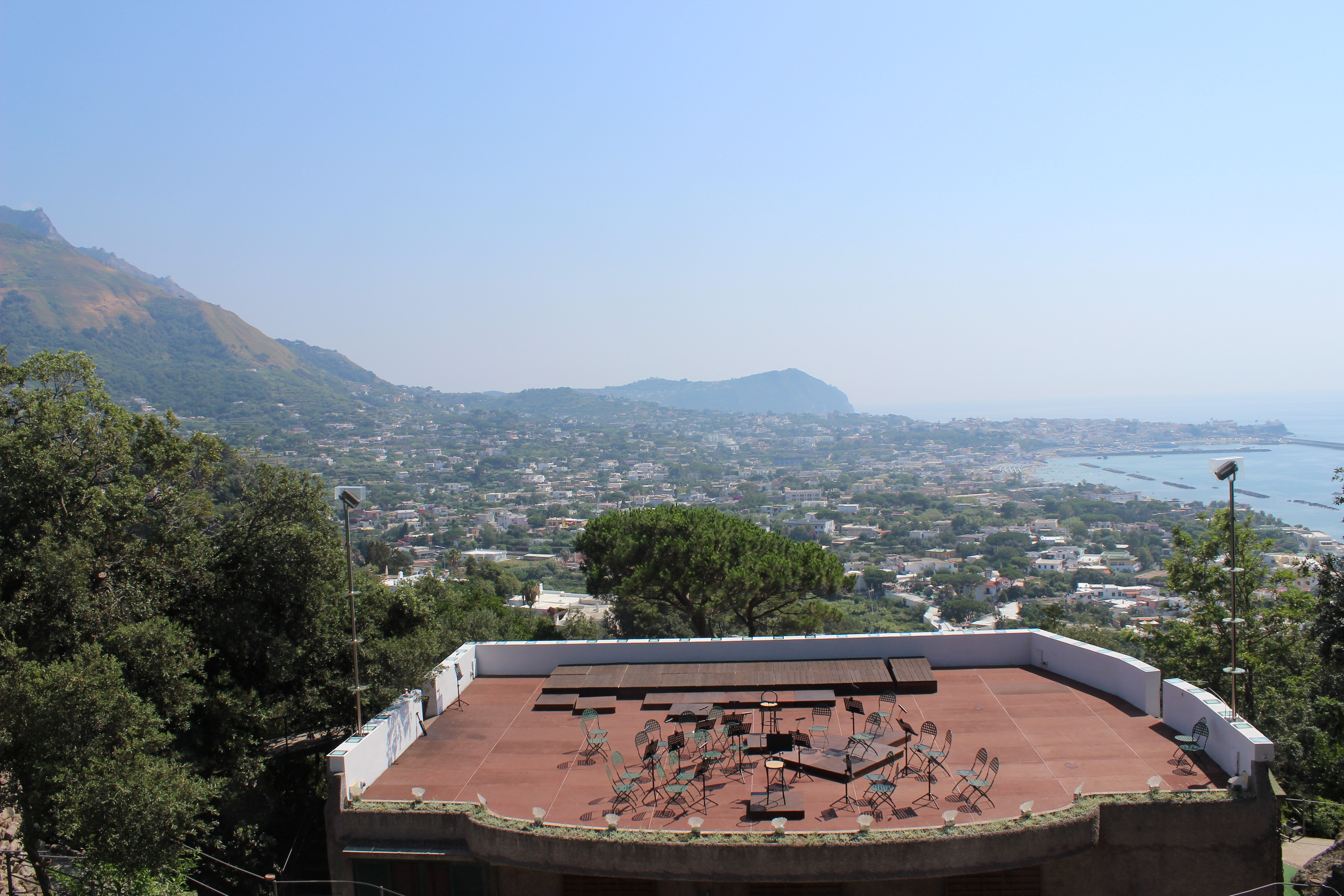 Ischia. La Mortella. Teatro Greco.